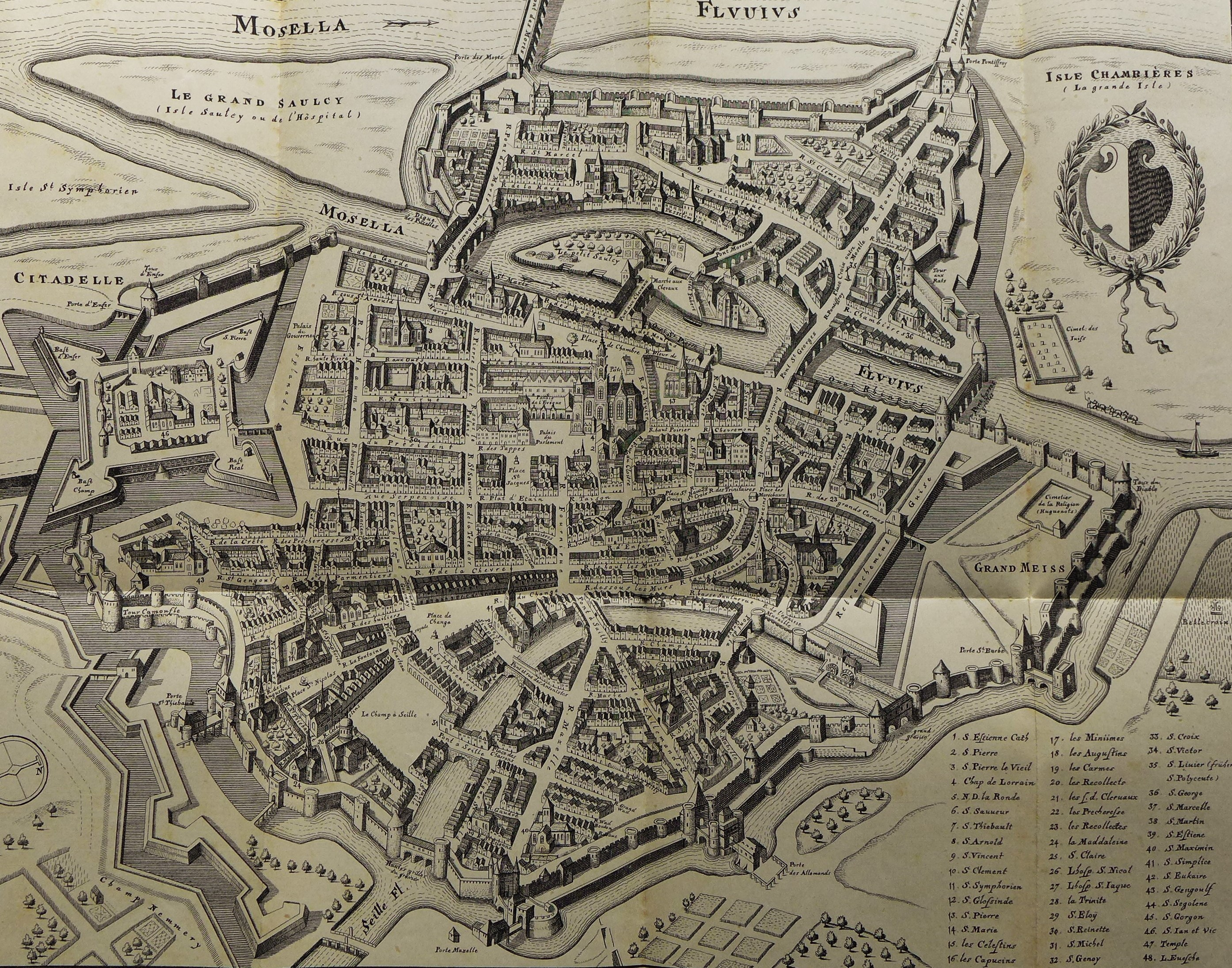 Plan der Stadt Metz aus dem Jahr 1652, aus: Major Westphal: Geschichte der Stadt Metz, Deutsche Buchhandlung (G. Lang), Metz 1875, Kartenanhang.